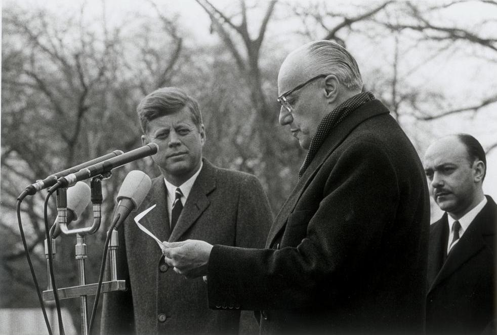 Sin fecha. El presidente Jorge Alessandri, en discurso,junto a el John F. Kennedy.